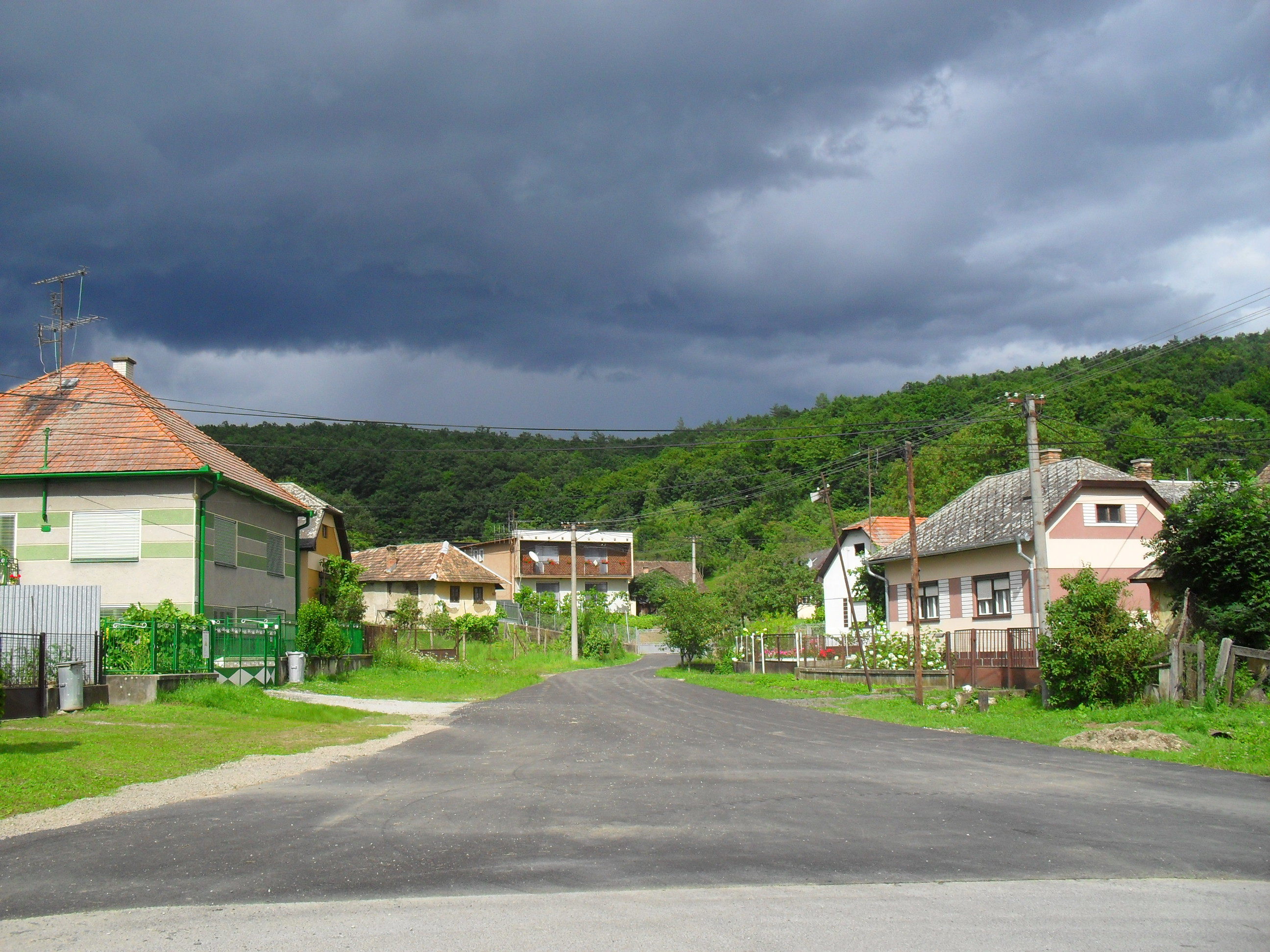 Felsőrás - utcakép